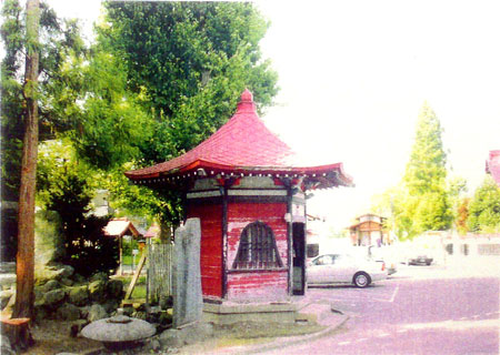 Rokkakudou at Tyoshouji